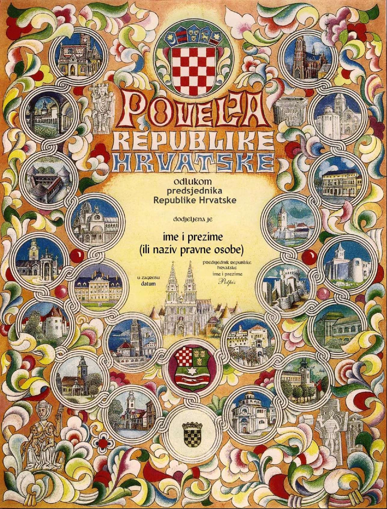 Povelja Republike Hrvatske